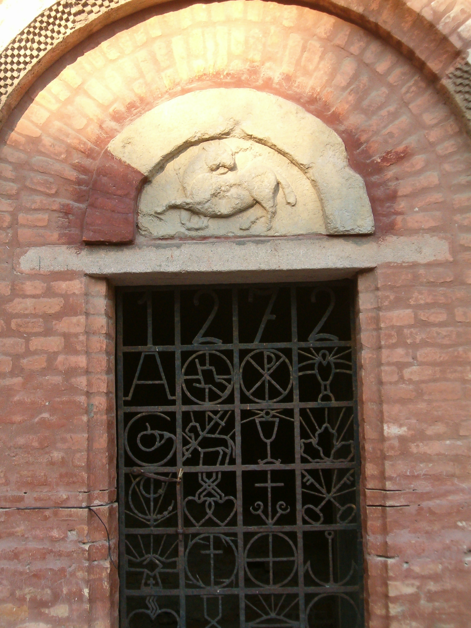 Hungary, Szeged; 2005; own photo: Váradi Zsolt A Dömötör-torony kőbáránya, Szeged legrégebbi szobra